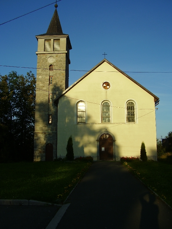 Crkva svetog Vida u Kupjaku